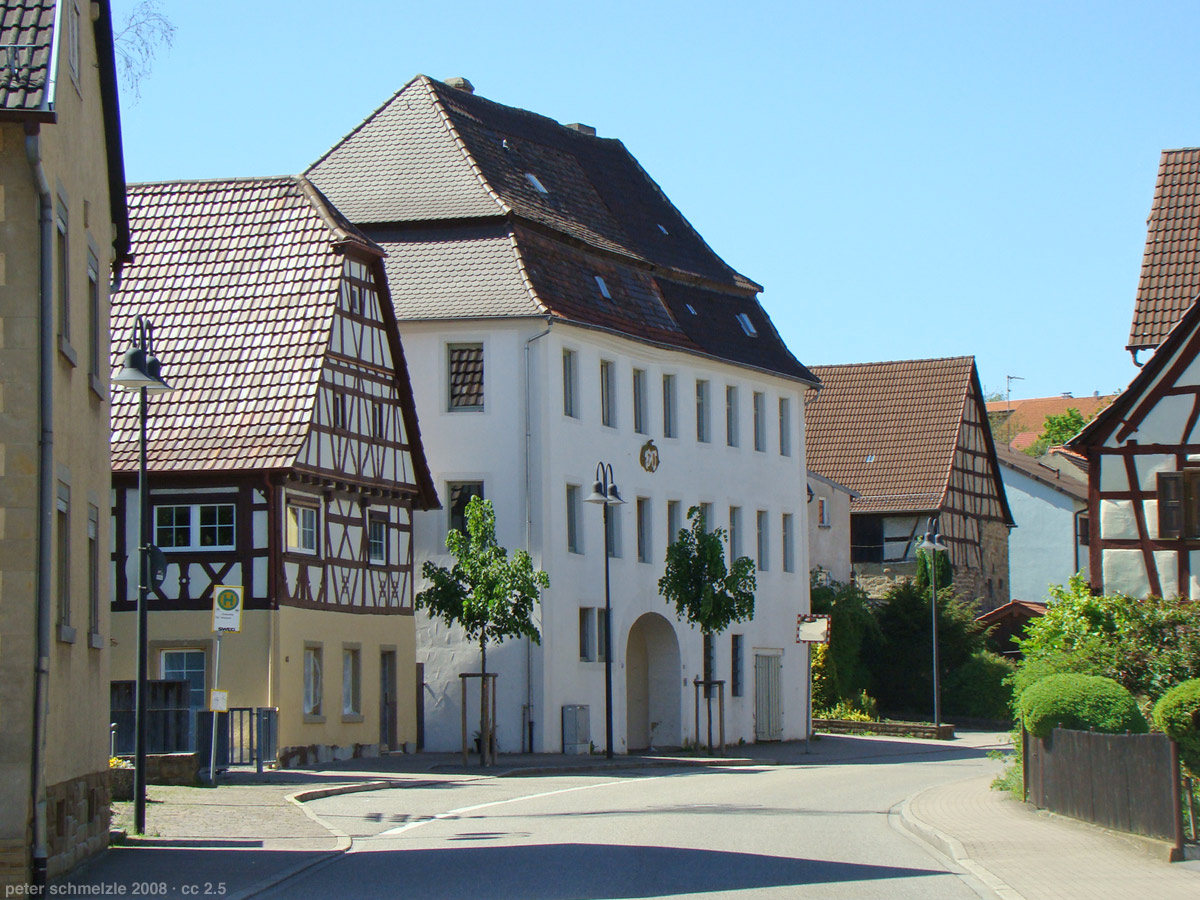 Herrenhaus der Freiherren von Venningen in Sinsheim-Weiler, links daneben hist. Gasthaus Adler von 1605